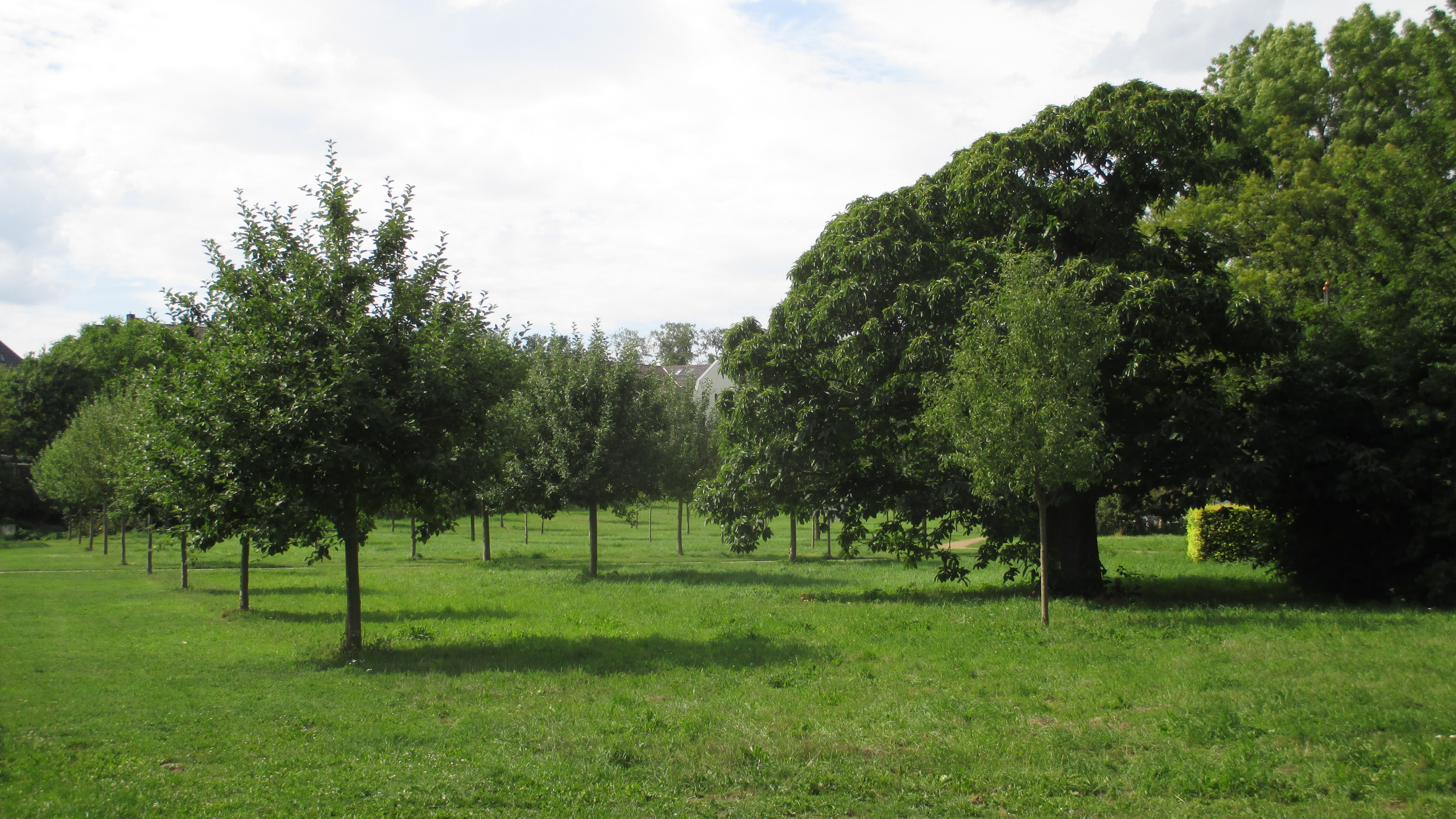 Auf der Hochzeitswiese / Grand Verger wachsen alte Obstbaumsorten.